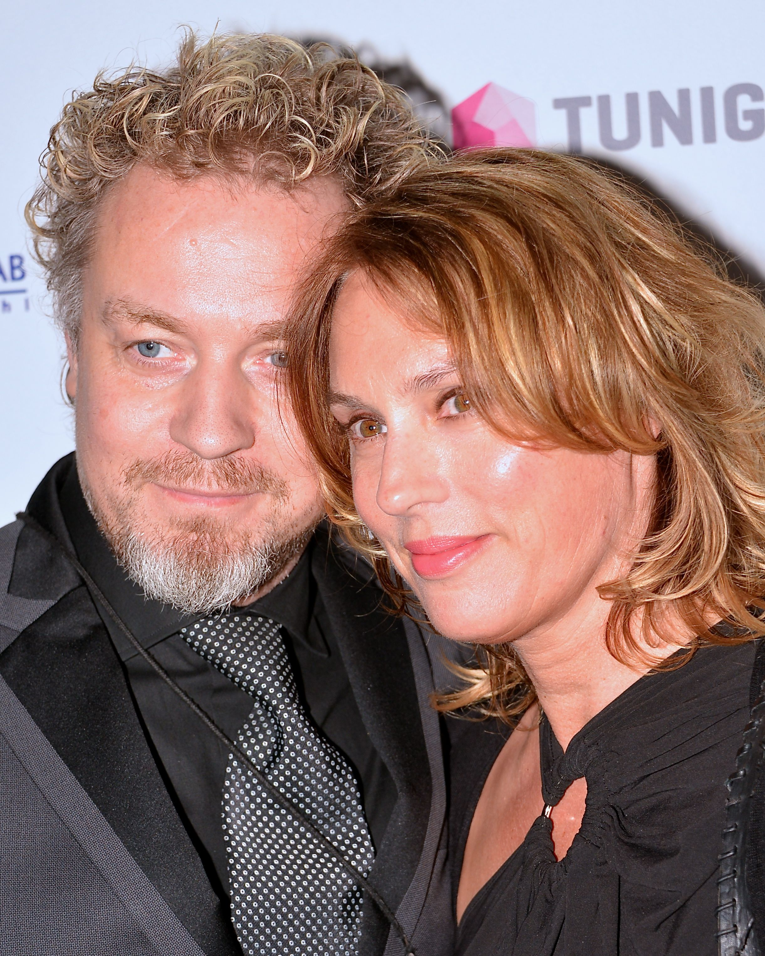 Erik Gadd & Cornelia Sojdelius på Grammisgalan på Cirkus, Stockholm den 20 februari 2013.